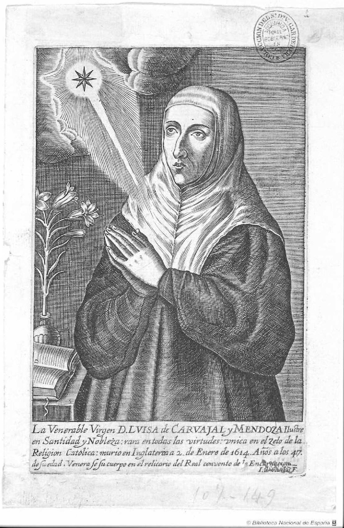 Juan de Courbes: Retrato de Luisa de Carvajal y Mendoza, estampa a buril incorporado a la Vida y virtudes de la venerable virgen Doña Luisa de Carvajal de Luis Muñoz. Inscripción: "La Venerable Virgen D. LVISA de CARVAJAL y MENDOZA Ilustre / en Santidad y Nobleza: rara en todas las virtudes: vnica en el zelo de la / Religión Catolica: murió en Inglaterra a 2 de Enero de 1614 años, a los 47. / de su edad. Venérase su cuerpo en el relicario del Real Convento de la Encarnación". Madrid, Biblioteca Nacional de España